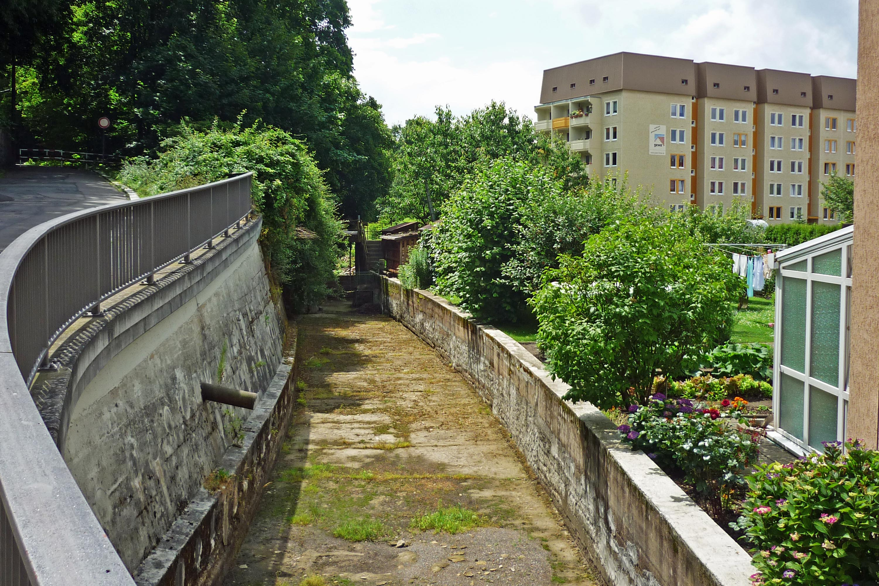 Weißeritz-Mühlgraben in Freital (Jägerstraße)